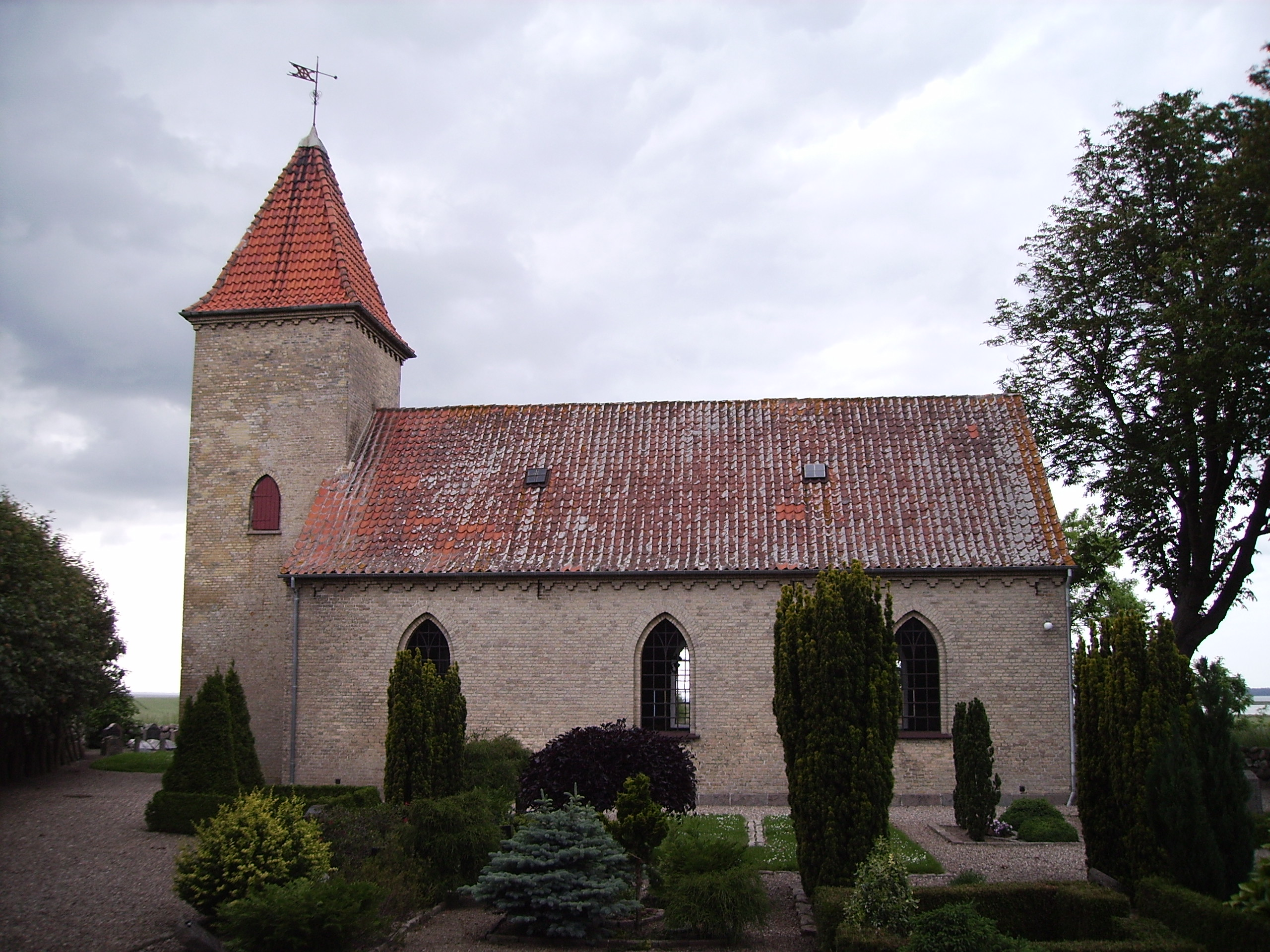 Bågø Kirke, Bågø Sogn, Båg Herred, Odense Amt, Denmark (Danish Church) - Bågø Kirke fra syd